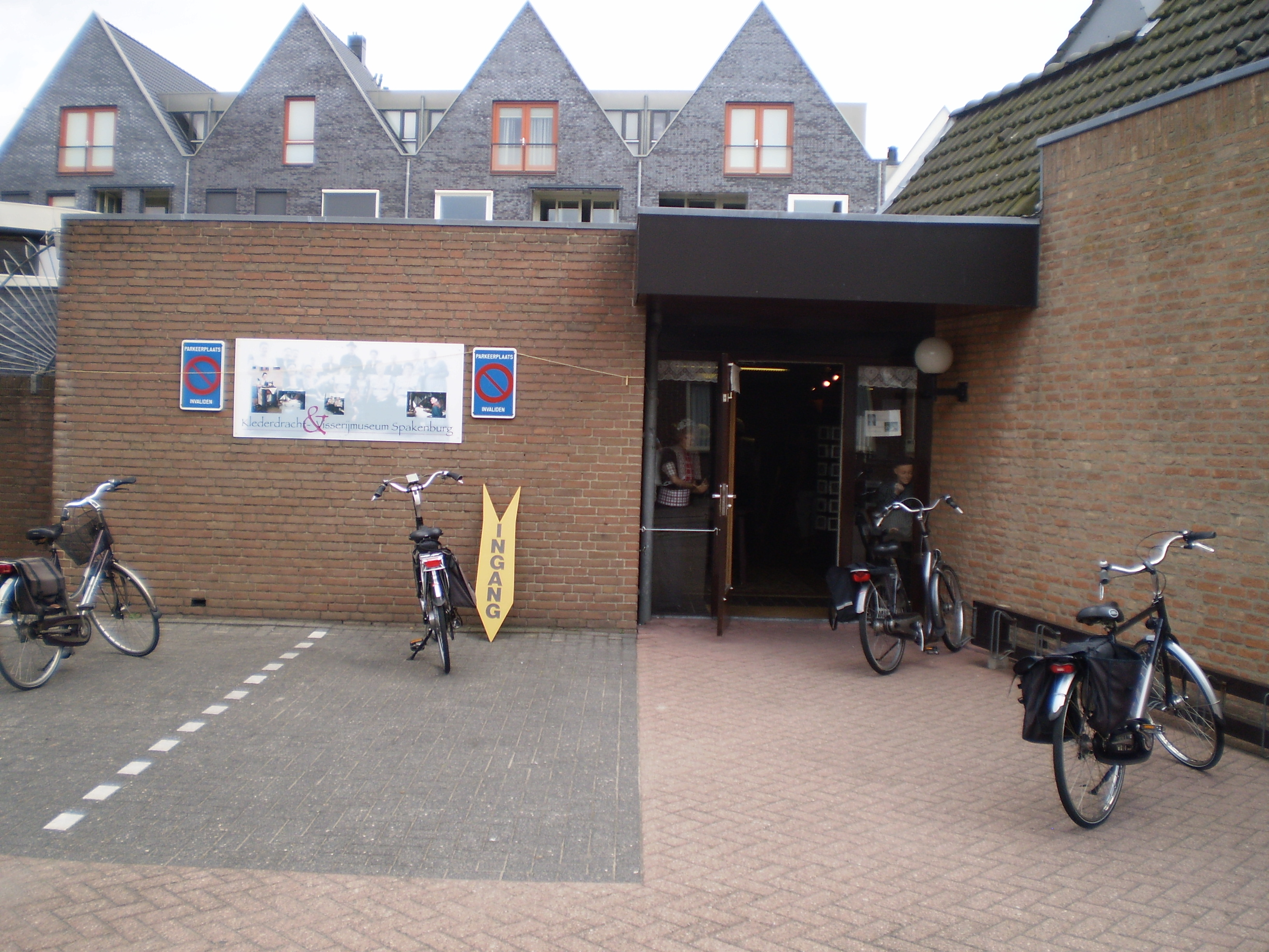 Ofbyld oanbean troch Swarte Kees op 20 augustus 2009